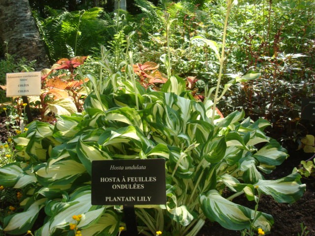 Hosta à feuilles ondulées, photo prise aux jardin de Métis, Grand-Métis, Québec, Canada. Été 2009.